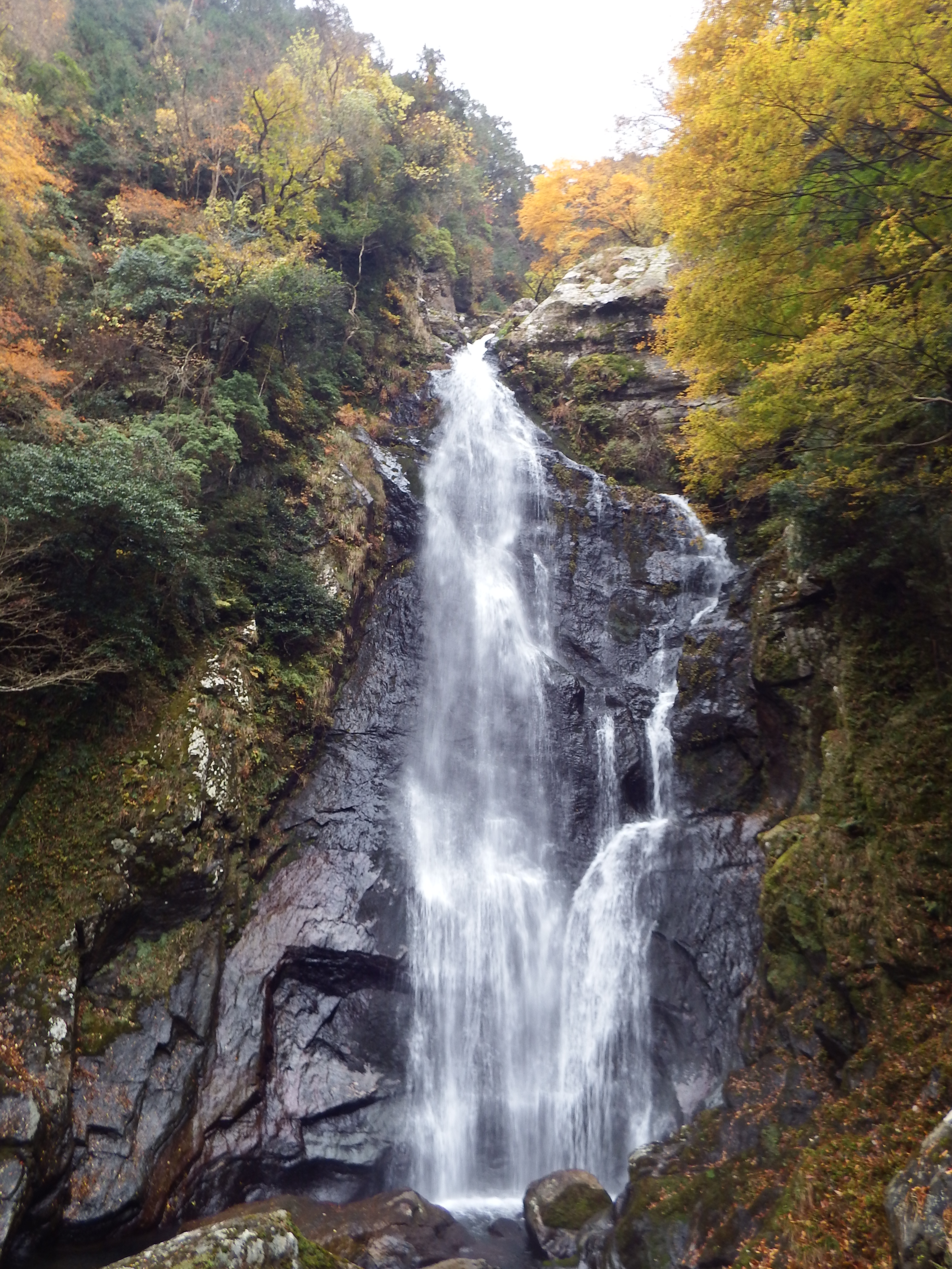 新居浜市の魔戸の滝